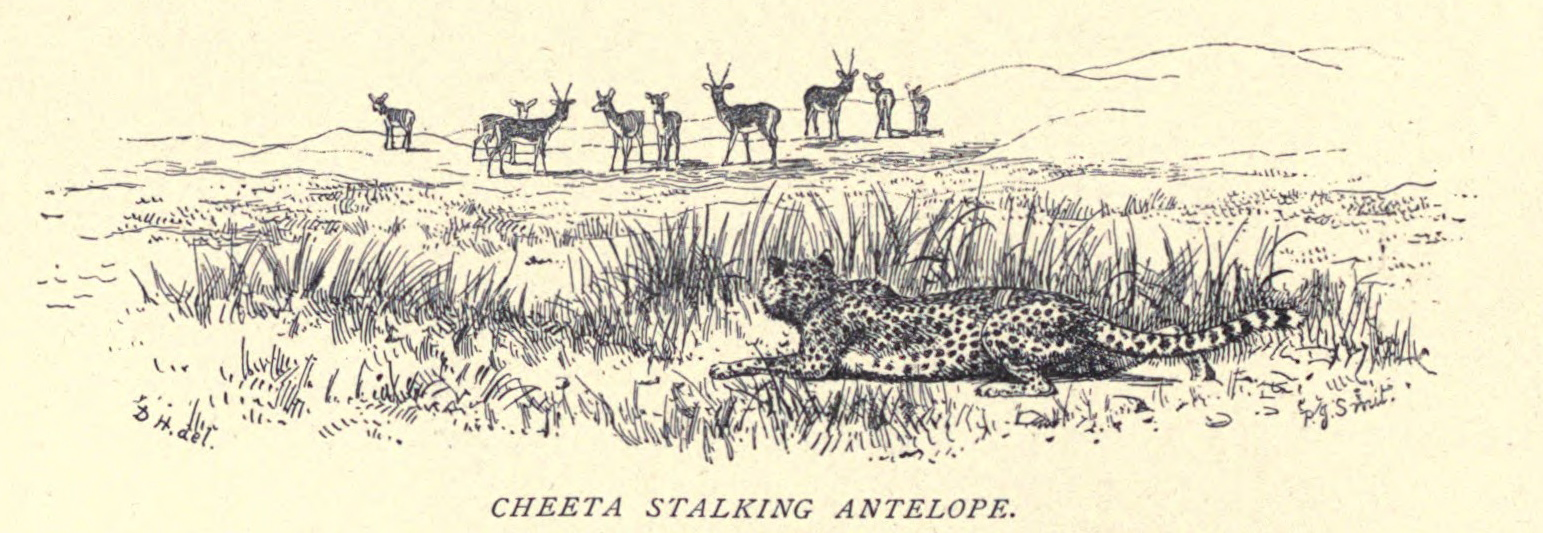 Cheeta stalking Antelope...10